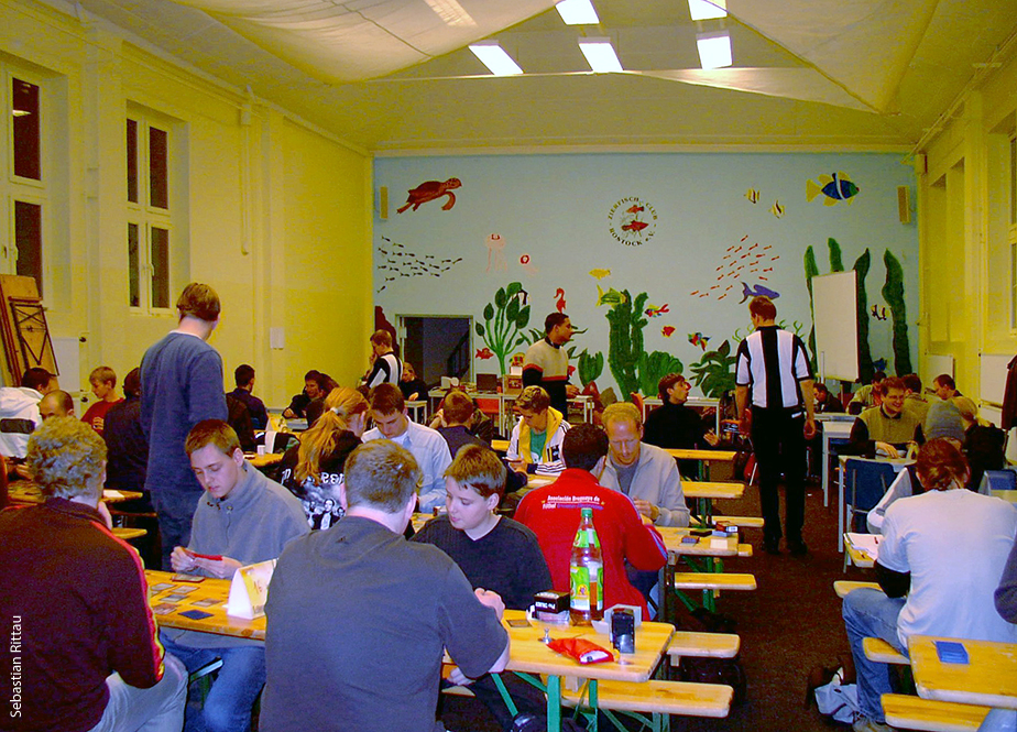 Турнір по Магія: Збір. Цікаво, що в залі зовсім немає жінок (Росток, Німеччина). Автор: Sebastian Rittau, 2004 рік